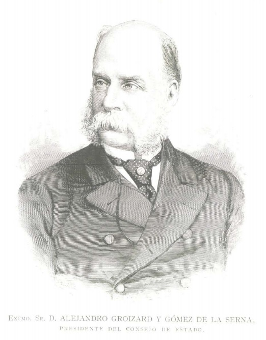 Retrato de Alejandro Groizard, recogido en la revista española La Ilustración Española y Americana.